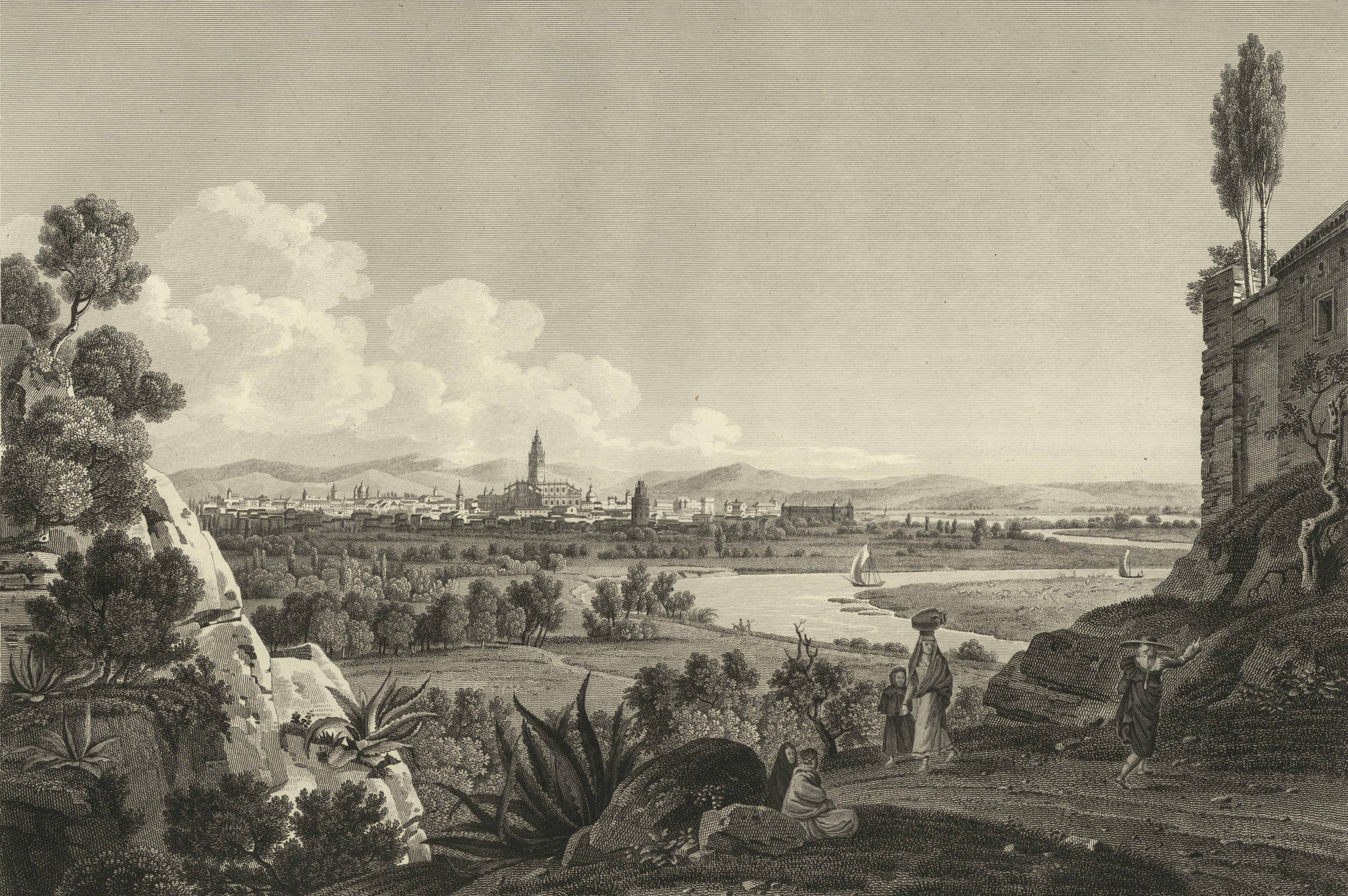 Vista de Sevilla tomada desde San Juan de Aznalfarache.